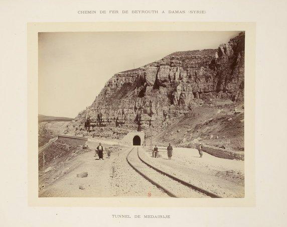 Tunnel de Medarije